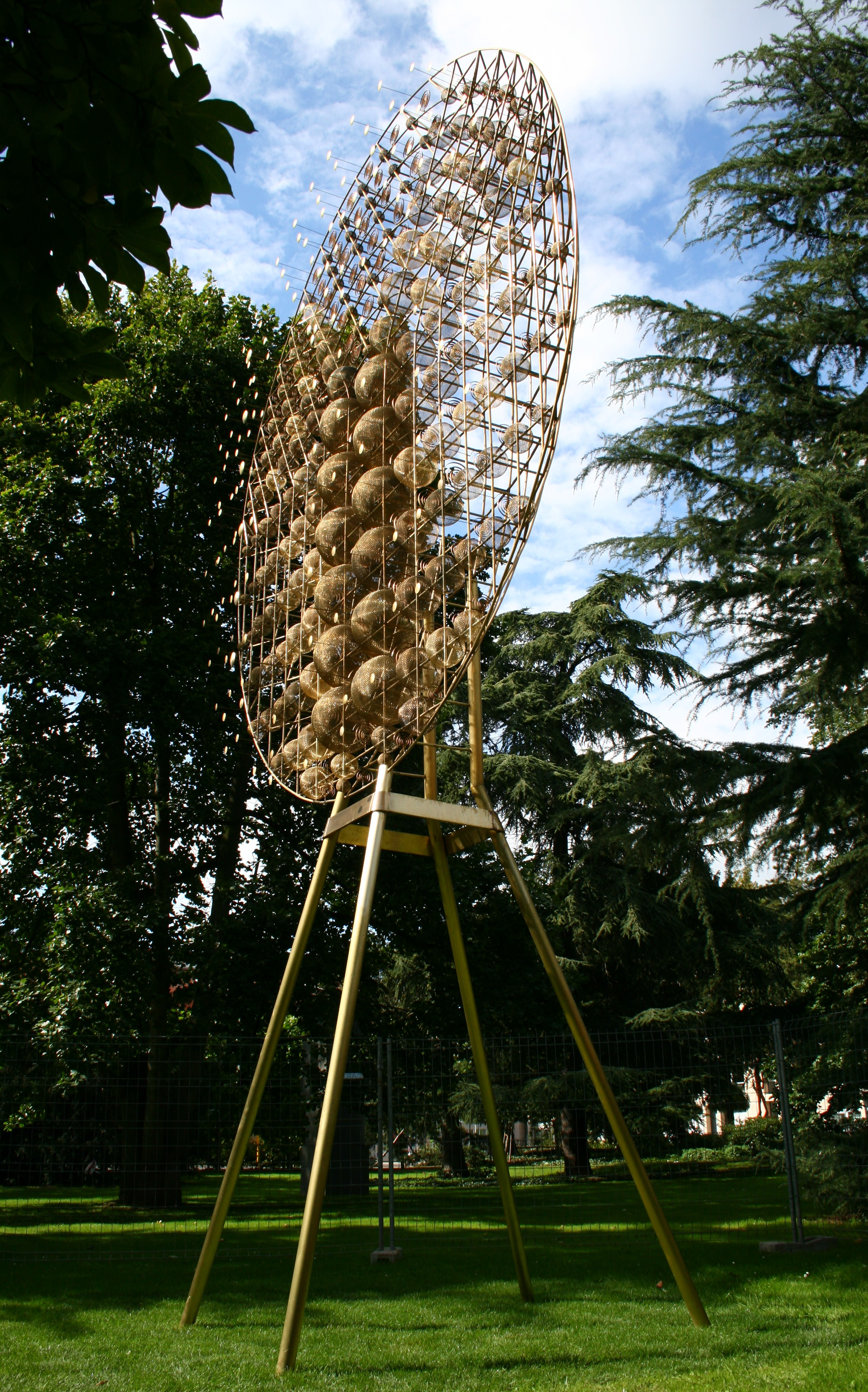 Skulptur "Optimus II" in der Skulpturensammlung Viersen. Selbst fotografiert.